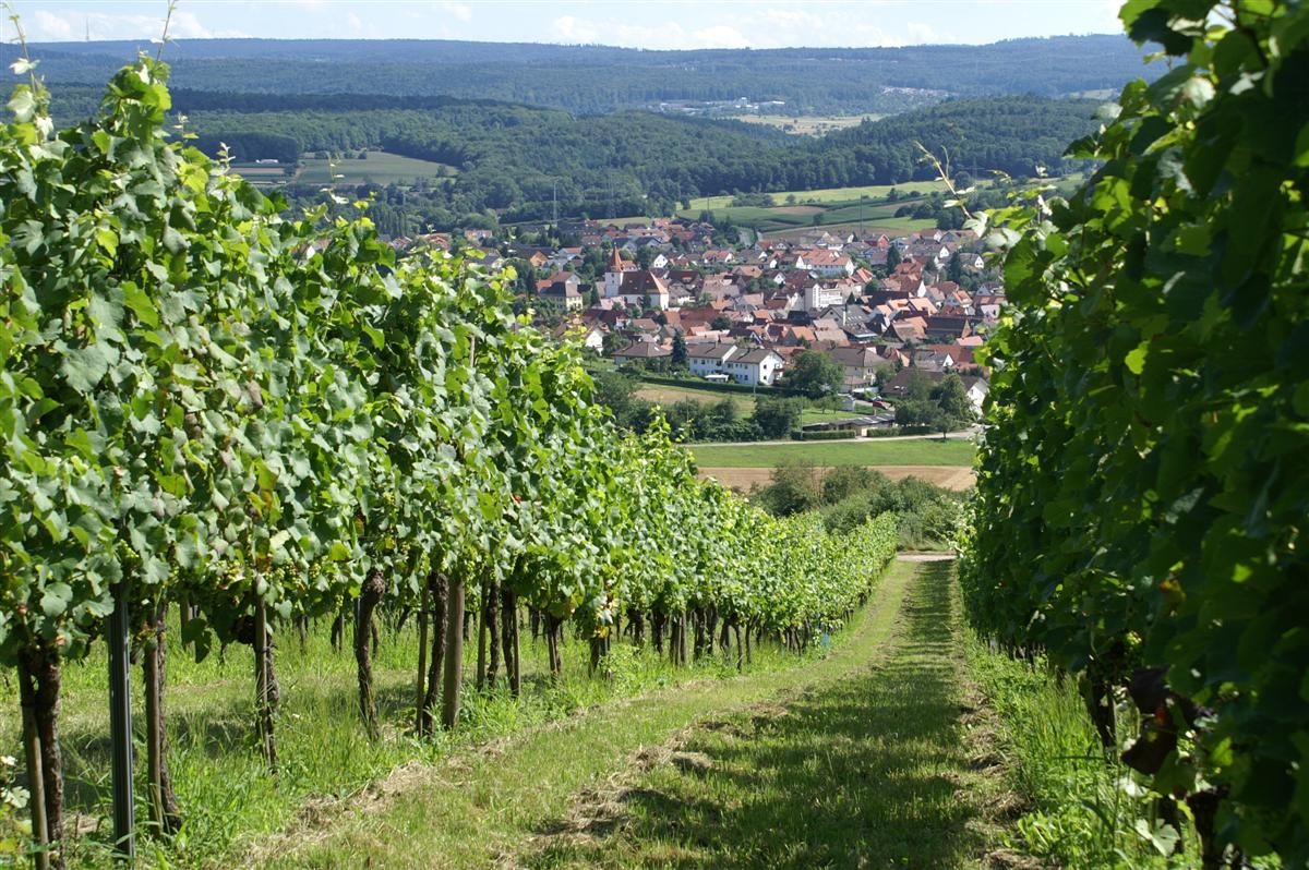 Ellmendingen Blick durch die Weinberge im Sommer